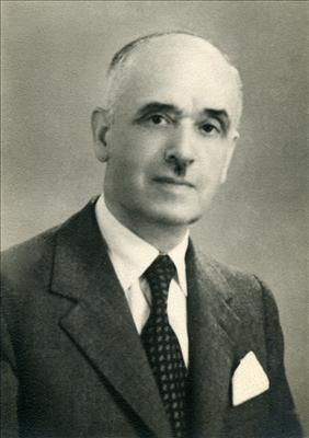 Carlo Calcaterra (1884-1952)